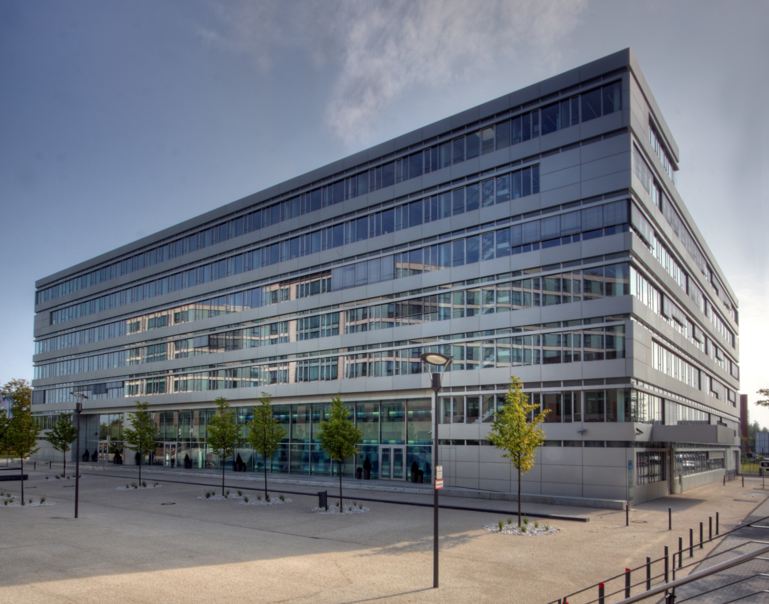 VDI Technologiezentrum in Düsseldorf, Zentrale des VDI